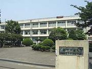 台工正門から職員室